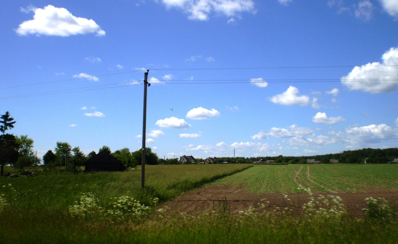 Stebuliai, Kėdainių raj.